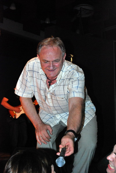 Mate Bulić na Grudskoj večeri u Zagrebu, 2009